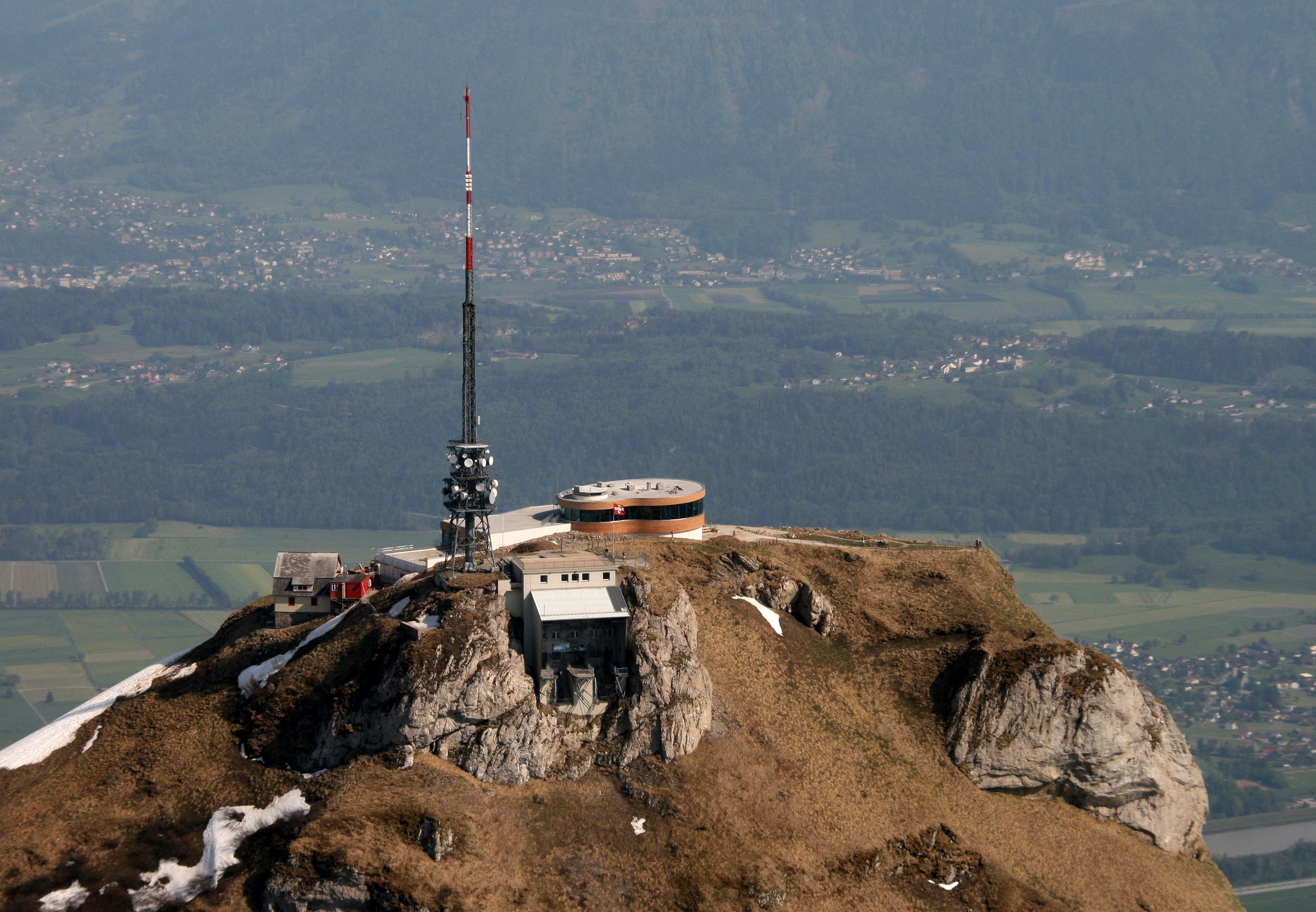 Luftaufnahme vom Bergrestaurant auf dem Hohen Kasten, aufgenommen während eines Fluges mit einer Propellermaschine des Types: D-EJCR Robin DR400-180R. Im Hintergrund sieht man das Vorarlberger Rheintal